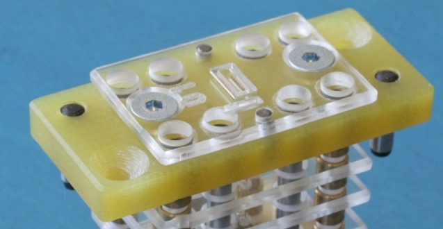 Ein Steckeradaper für ein Handprüfgerät